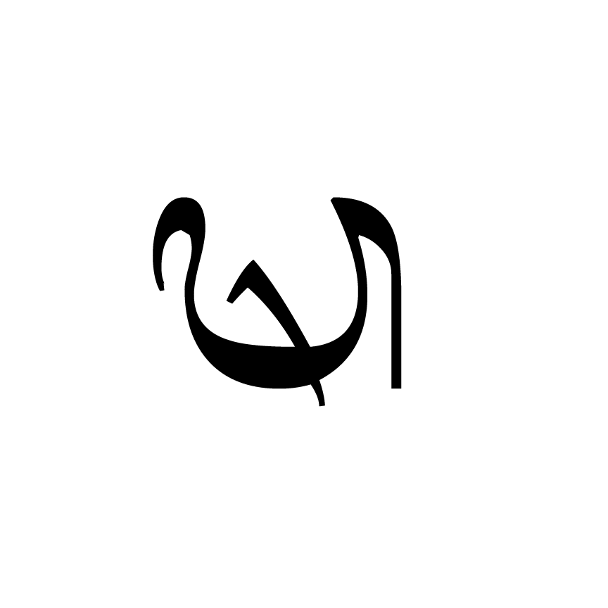 Balinese letter Ssa